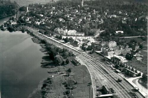 Flygfotografi över Gnesta med dess stationsområde 1934.